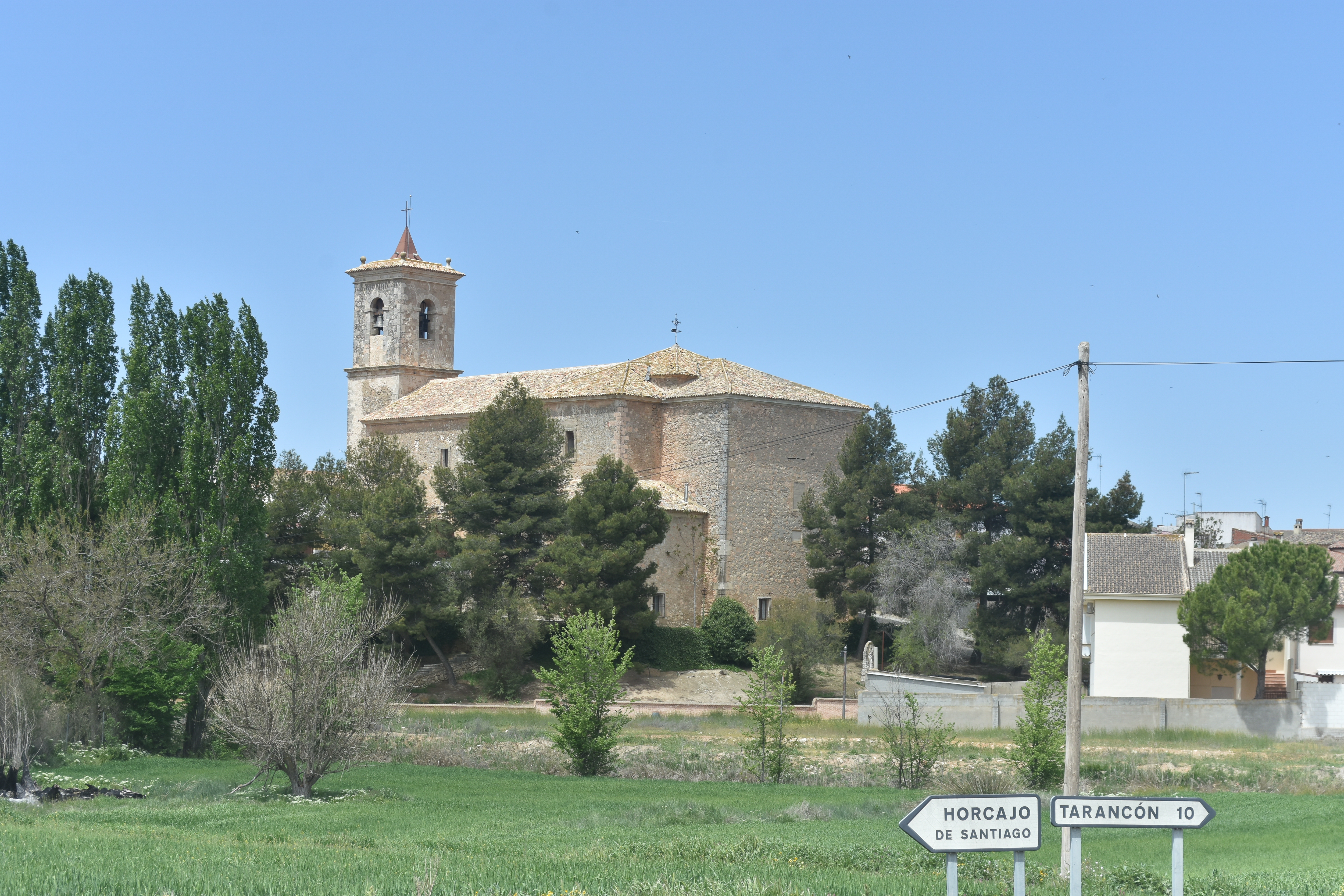 Iglesia de Santiago, Pozorrubio de Santiago.